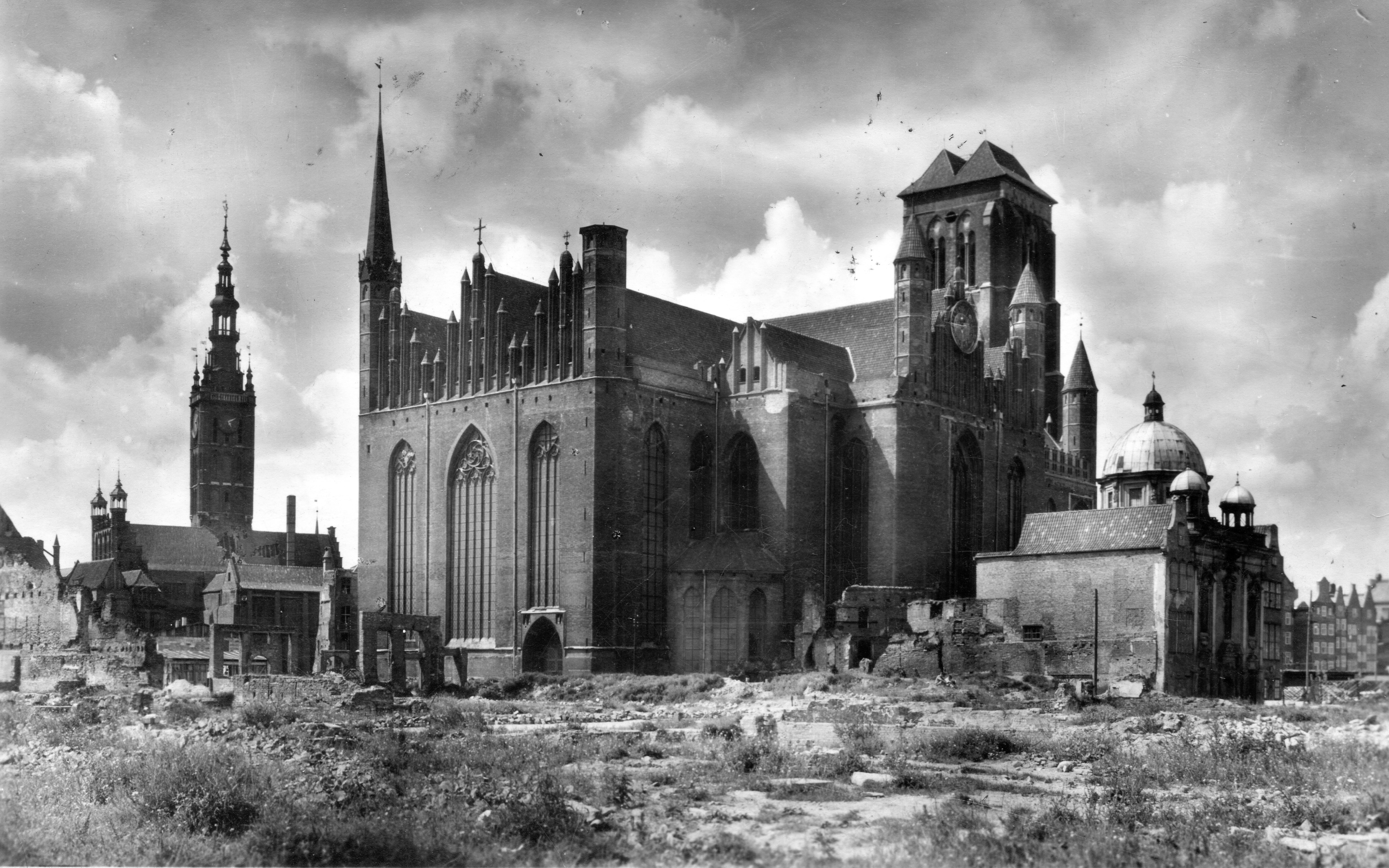 Szűz Mária-templom az ulica Świetego Ducha felől nézve.